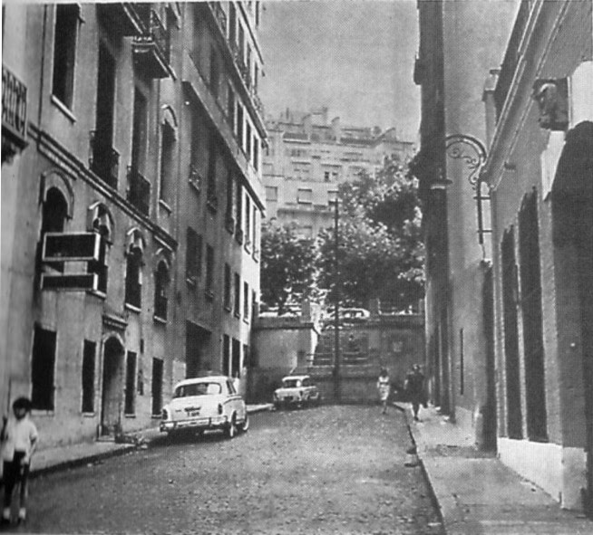 Vista del Pasaje Seaver, desaparecido callejón de Buenos Aires, hacia fines de los años '60.